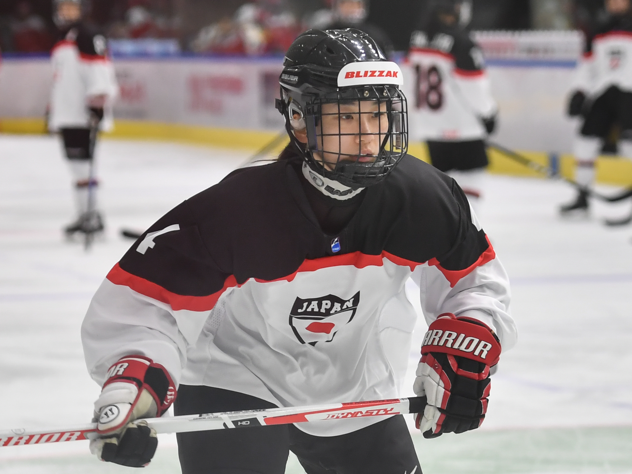 IIHF Eishockey Damen Weltmeisterschaft Division IA am 16. April 2017 in Graz.Bild zeigt Ayaka TOKO (JPN).